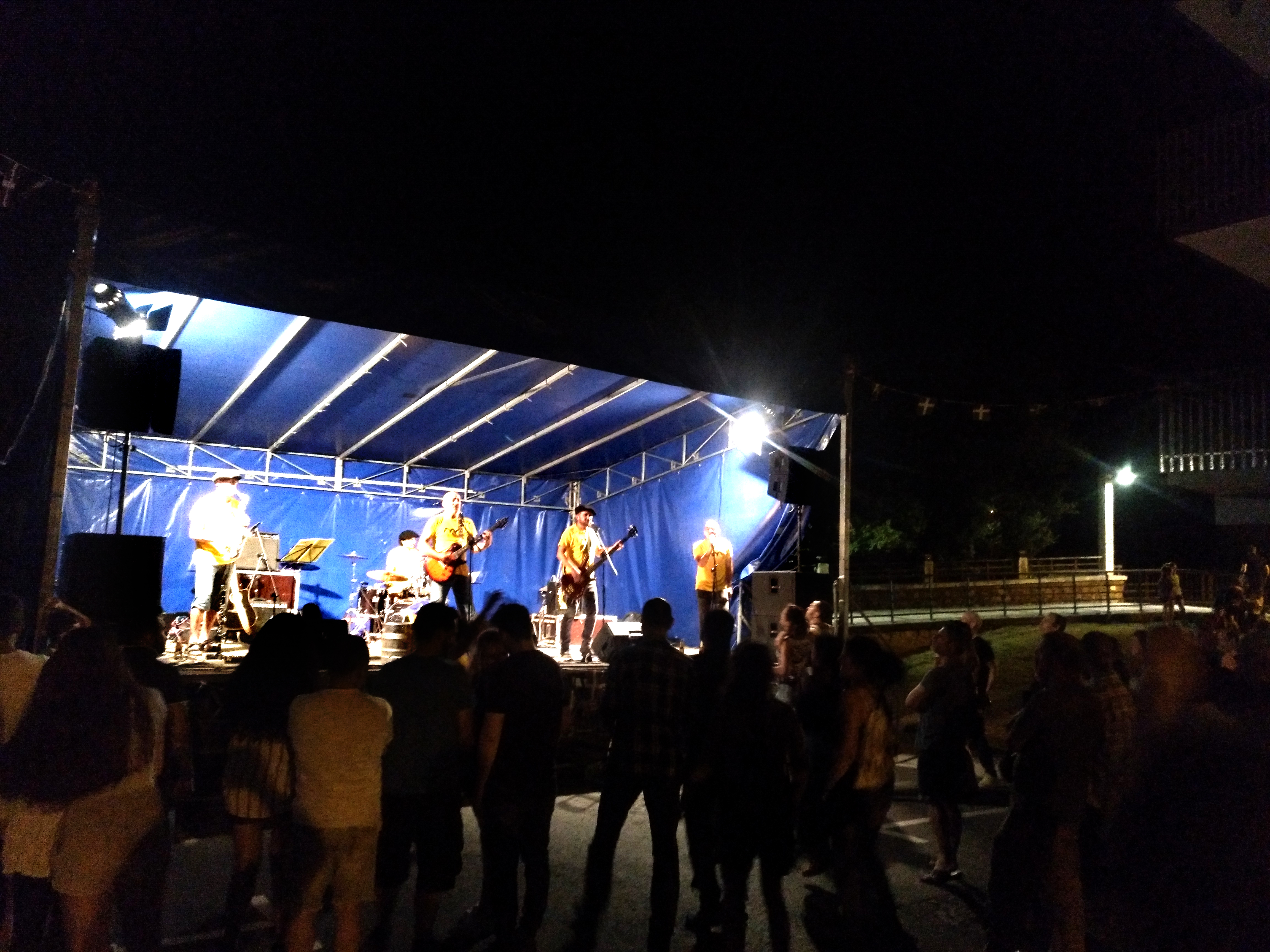 Bixentak taldea Portasol auzoko jaietan (Aretxabaleta)